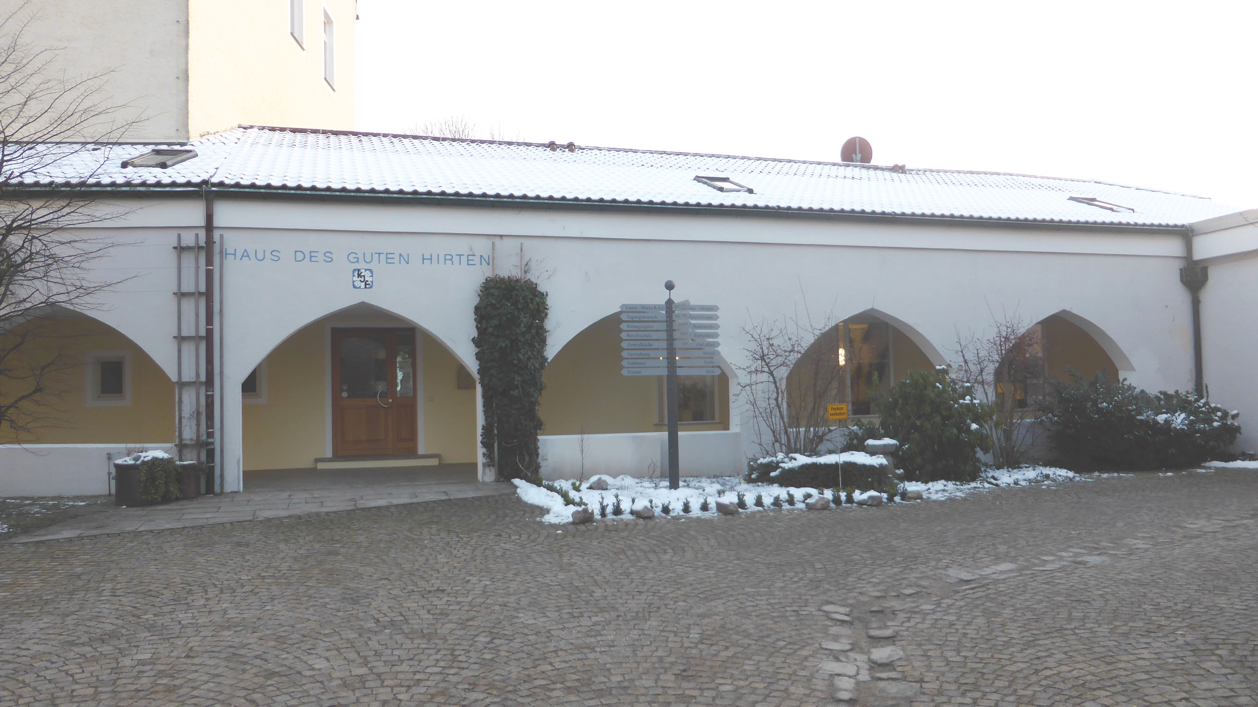 Neues Schloss Ettmannsdorf - Innenarkaden